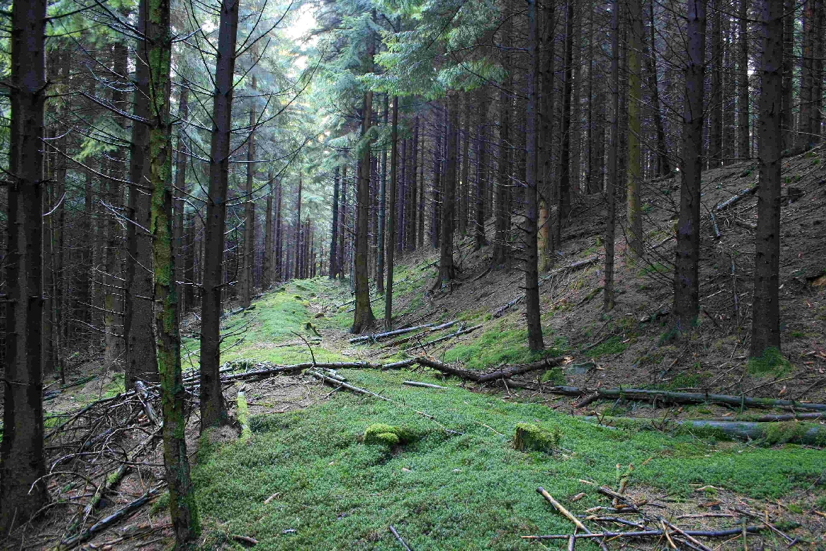 umlaufender Wall der Wallanlage Hofkühl bei Lennestadt-Kirchveischede